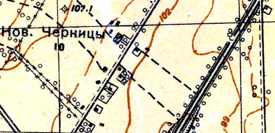 Топографическая карта Ленинградской области, квадрат О-36-13-А-в (Красногвардейск), деревня Новые Черницы